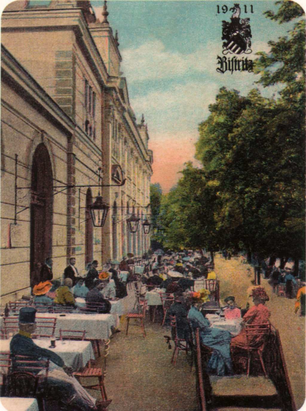 Bistriţa 1911